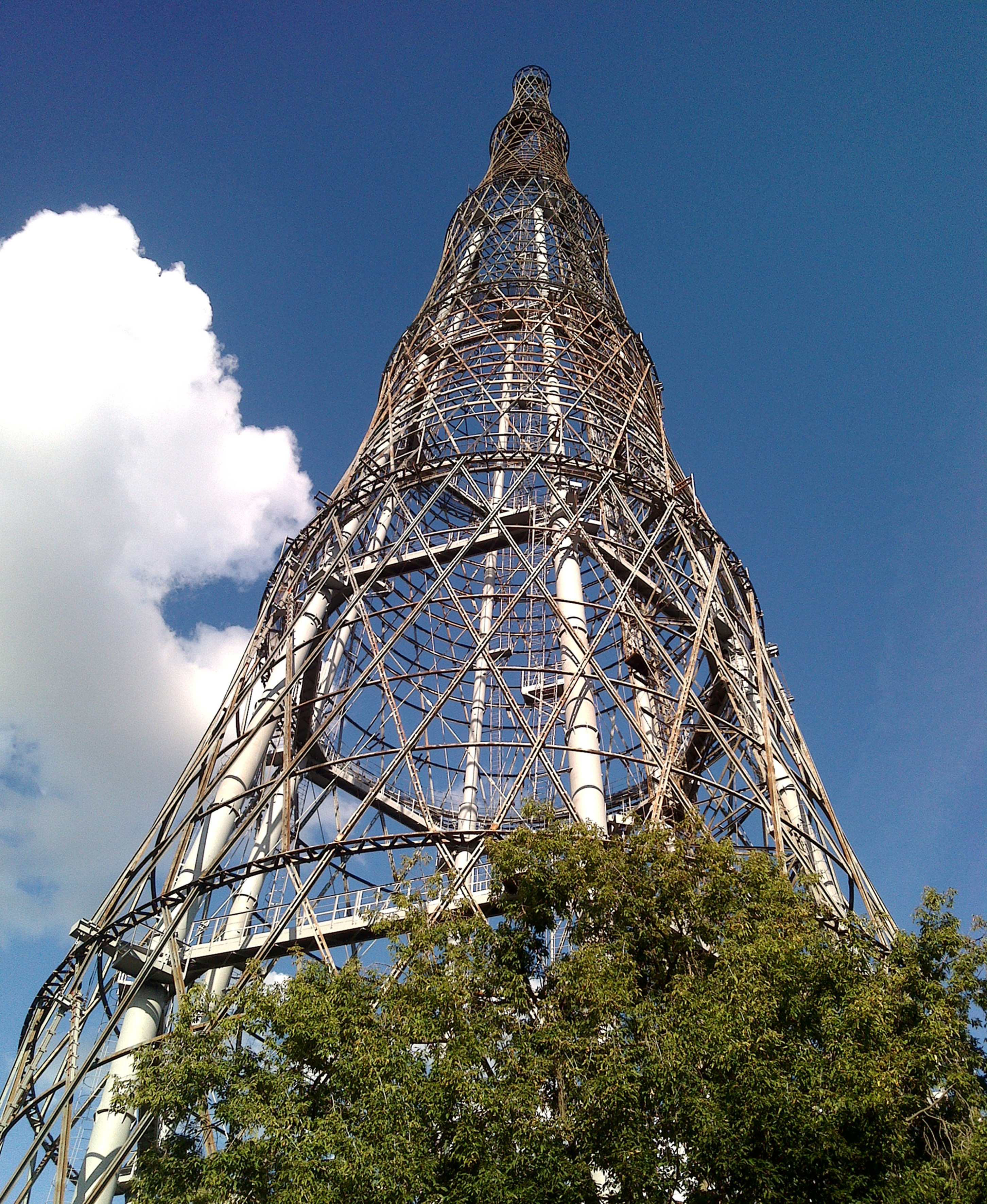 Шуховская башня в Москве покрыта ржавчиной и не защищена от коррозии. Бурые пятна коррозии по всей конструкции и максимально на третьей секции. Внутрь башни встроена антиаварийная конструкция из толстых труб, исказившая легкий ажурный силуэт башни инженера Шухова. Съёмка башни произведена в четверг в рабочее время - реставраторов на башне нет.